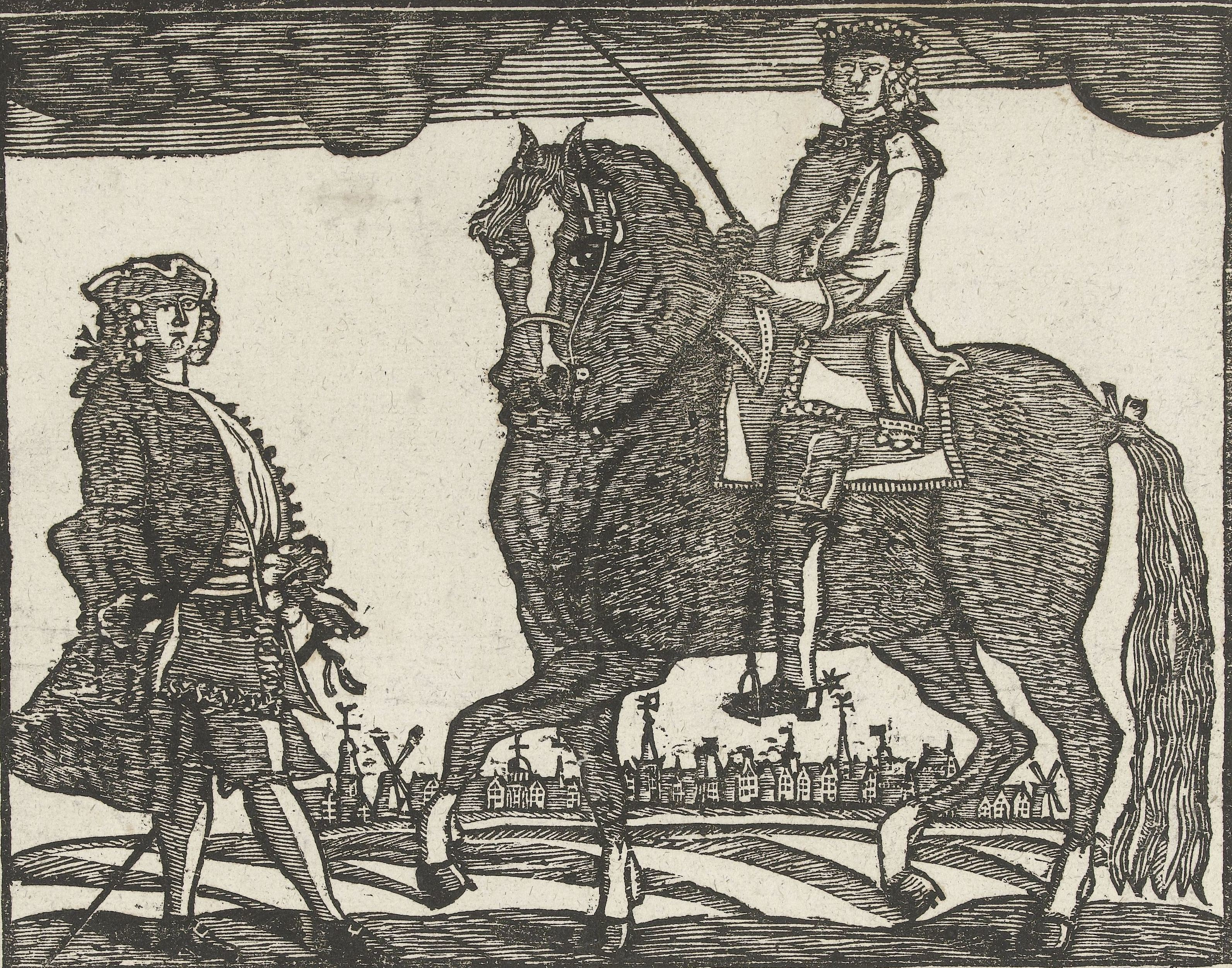 St. Nicolaas als hooggeplaatst persoon te paard met zijn knecht ernaast. Onder de voorstelling een rijm over Sint Nicolaas.